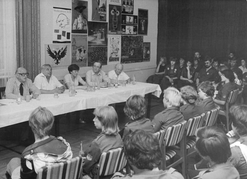 ADN-ZB Zimmermann 3.6.1979 Berlin: Festival Im Klub der Kulturschaffenden "Johannes R. Becher" fand ein vielbesuchtes Forum mit Wissenschaftlern statt. Zu den prominenten Gästen gehörten der Historiker W. Bartel, der Architekt H. Henselmann, die Medizinerin A. Sälzler , H. Jacobus und der Mediziner H. Kraatz (v.r.).